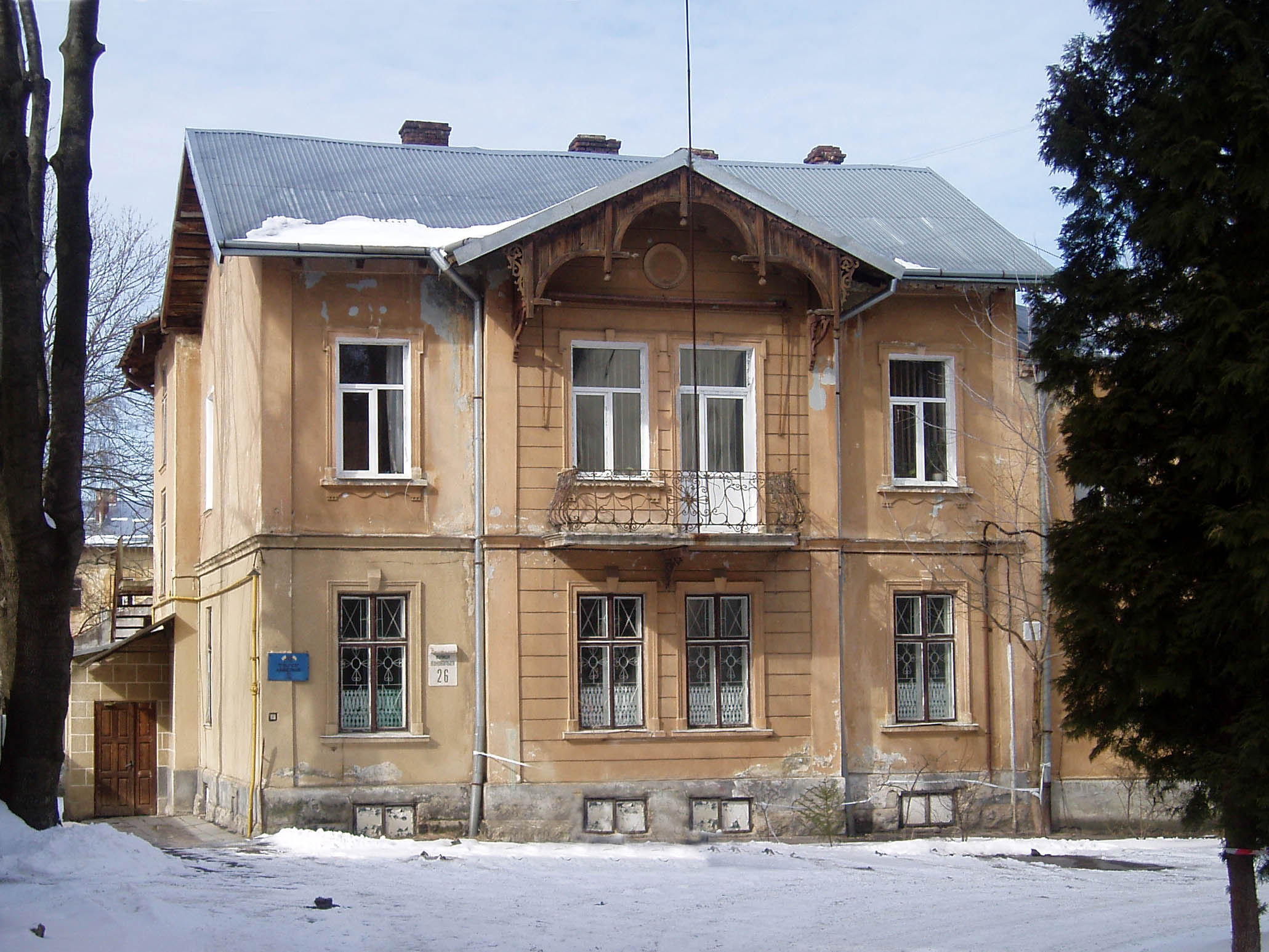 Будинок № 26 на вулиці Коновальця у Львові. Збудований за проектом Яна Карасінського (1894).